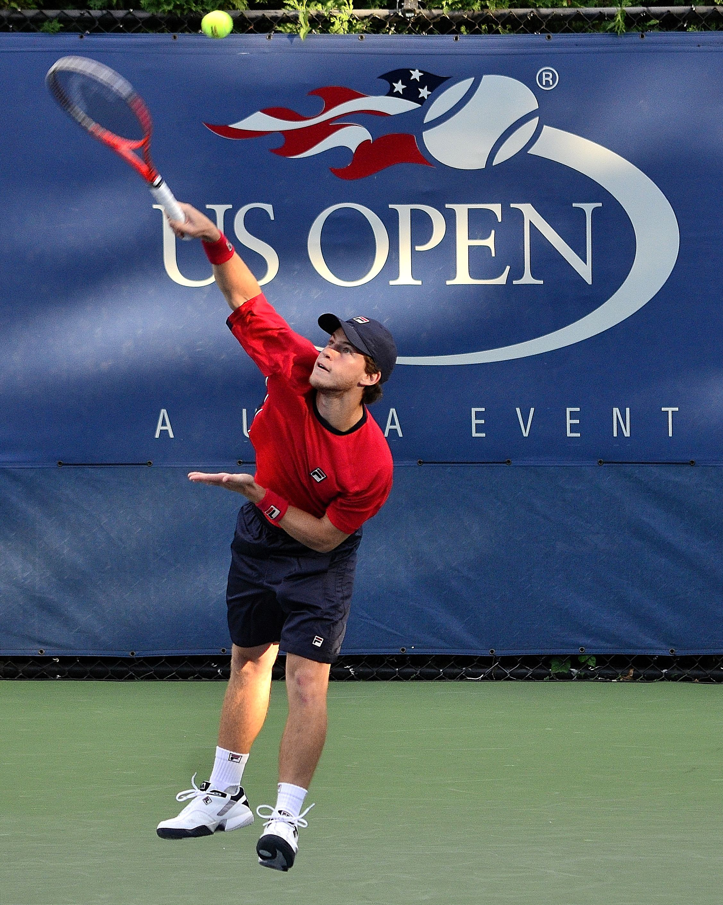 Queens, NY August 23, 2013 Albano Olivetti (FRA) def. Diego Schwartzman (ARG)